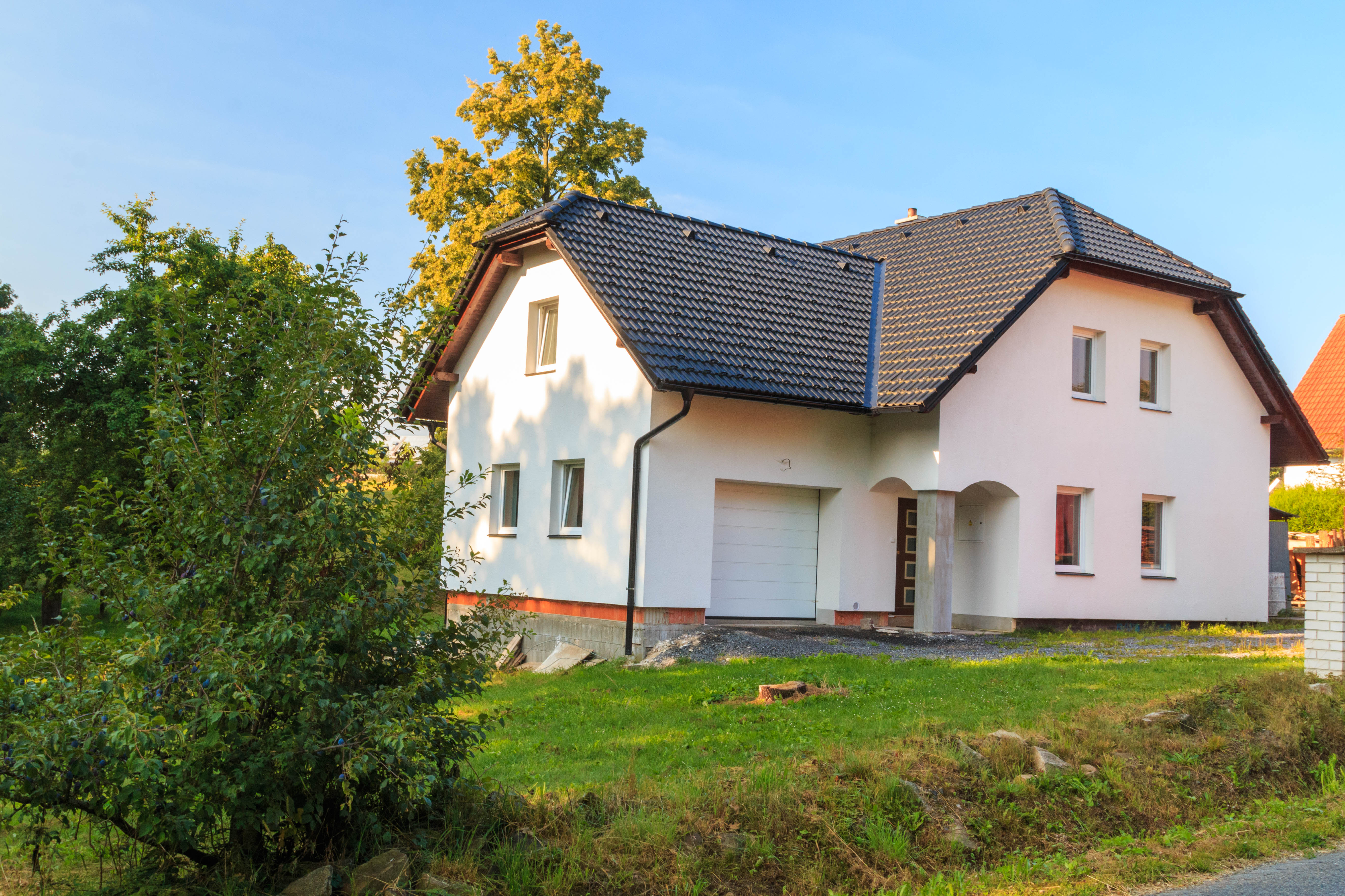 Příkrakov - čp. 20